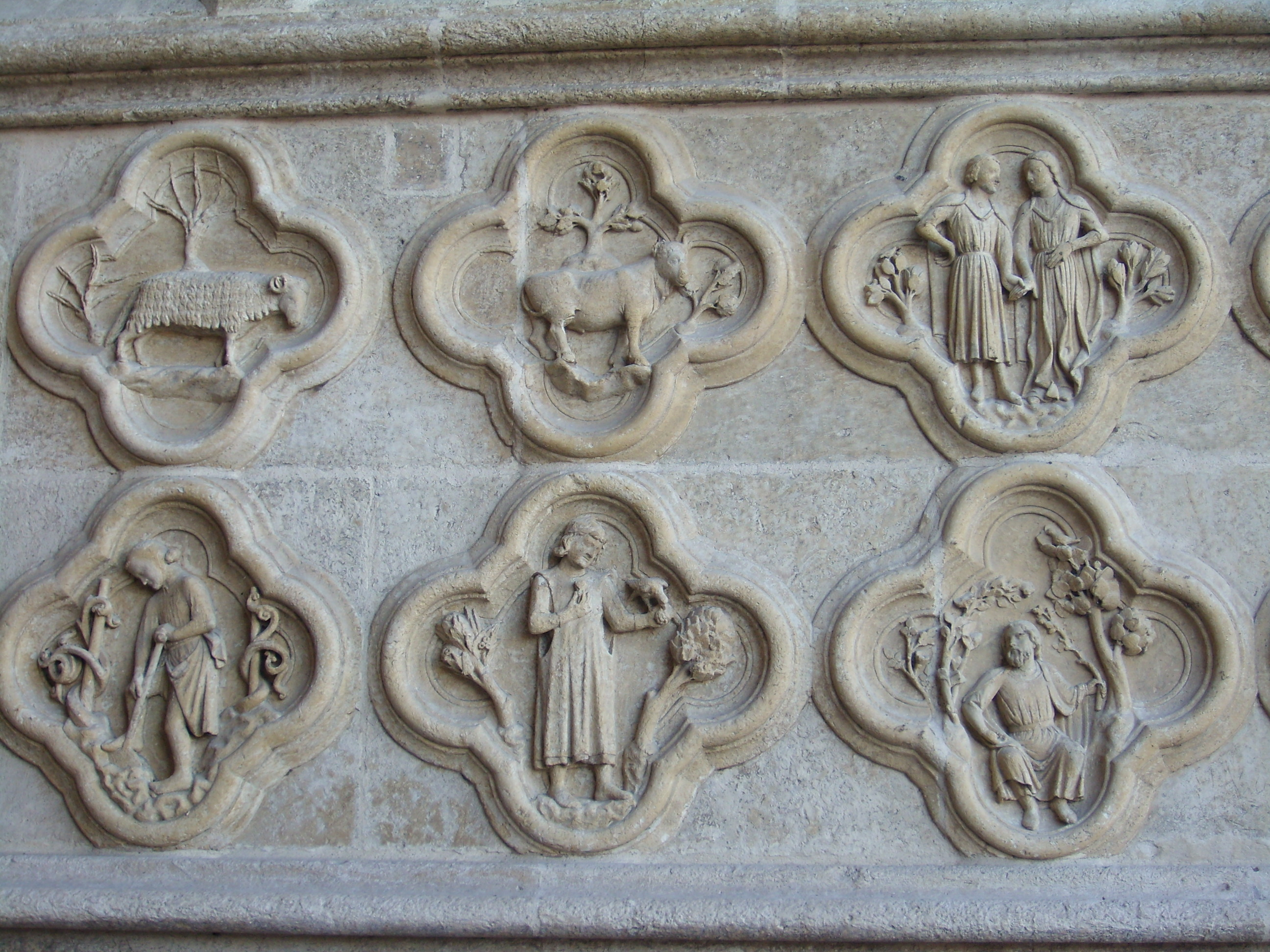 Facade de ND d'Amiens : Signes du zodiaque (Bélier/ Taureau/ Gémeaux) et occupations agrestes